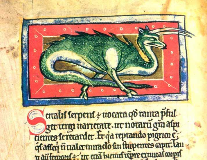 Raffigurazione e descrizione di una scitale in un bestiario medievale.